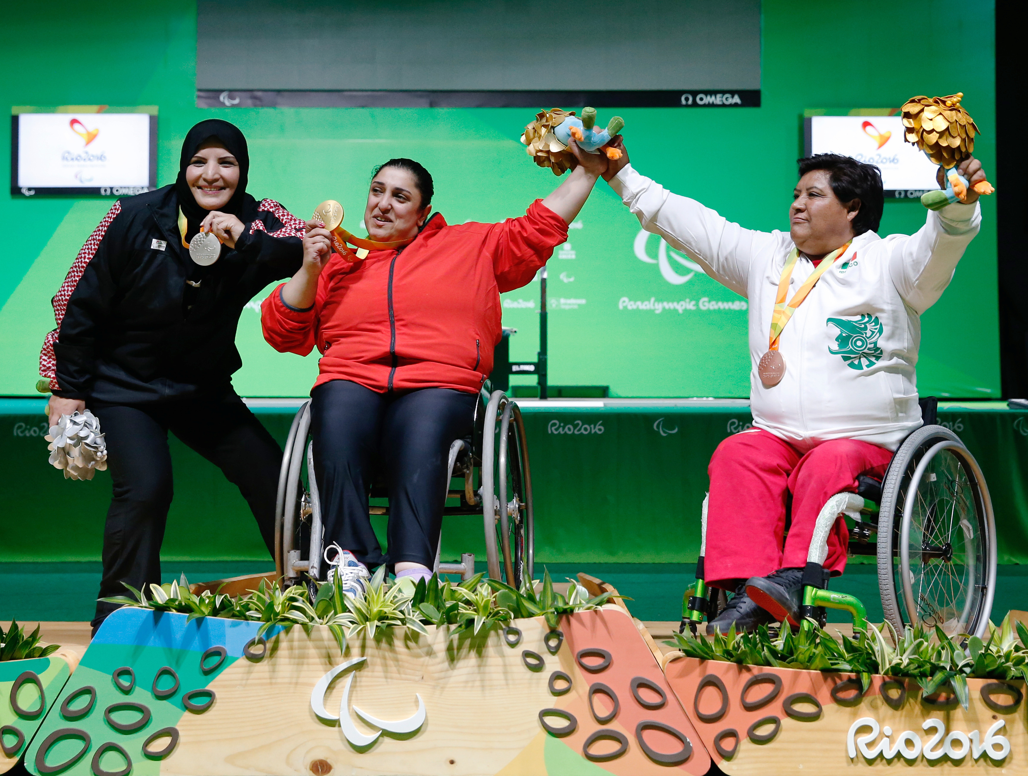 Rio de Janeiro - Randa Mahmoud, do Egito, ouro, Tharwah Alhajaj, da Jordânia, prata, e Catalina Diaz Vilchis, do México, bronze, no levantamento de peso, até 86 kg, na Paralimpíada Rio 2016 (Fernando Frazão/Agência Brasil)